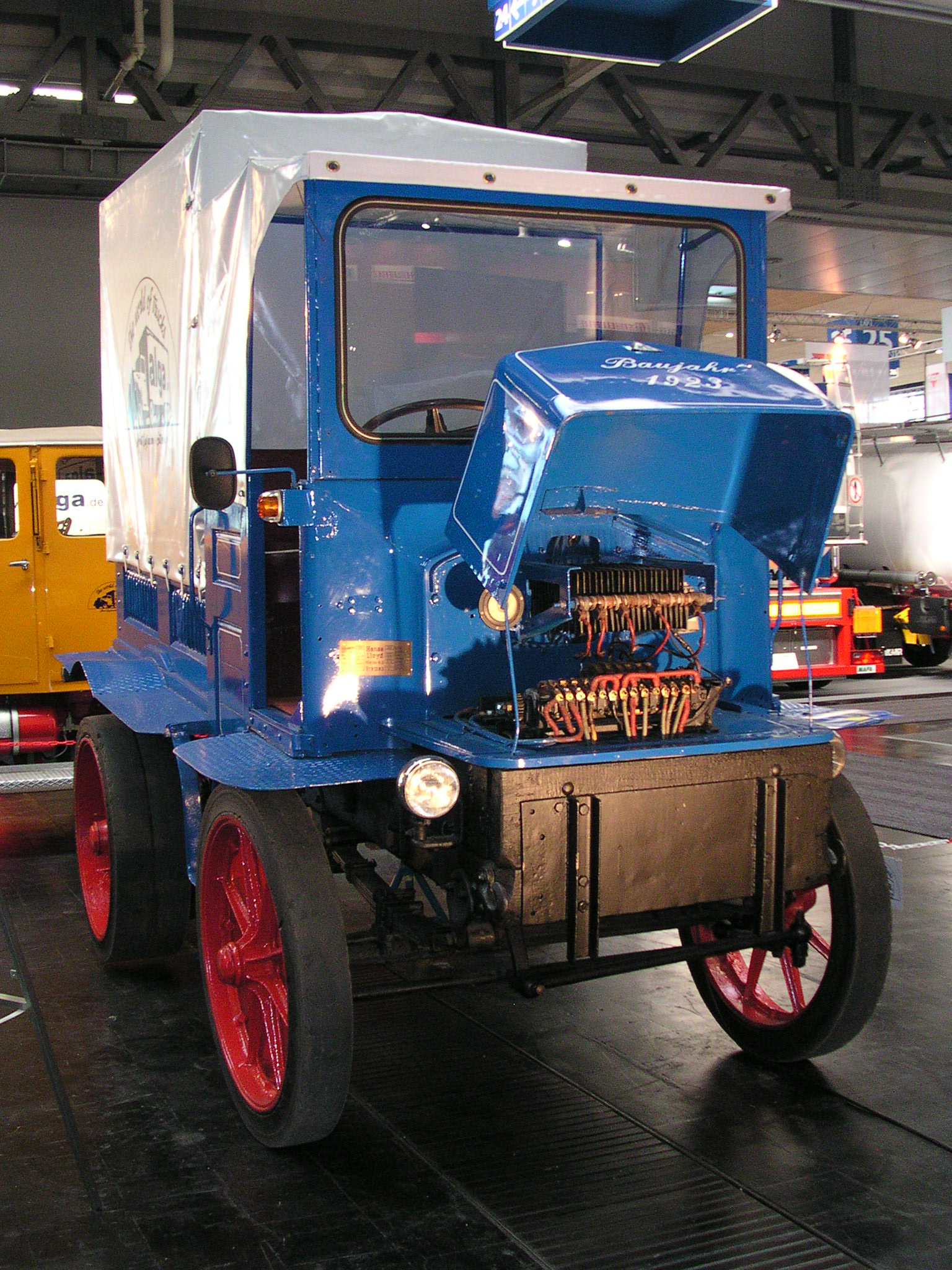 Hansa-Lloyd Elektro-Lastwagen CL5 oder DL5, gesehen bei der IAA für Nutzfahrzeuge am 30.9.2004 in Hannover am Stand der Firma Alga. Baujahr 1923, Aktionsradius 35 km, Höchstgeschwindigkeit 12 km/h, Länge 6,50 m, Breite 2,00 m